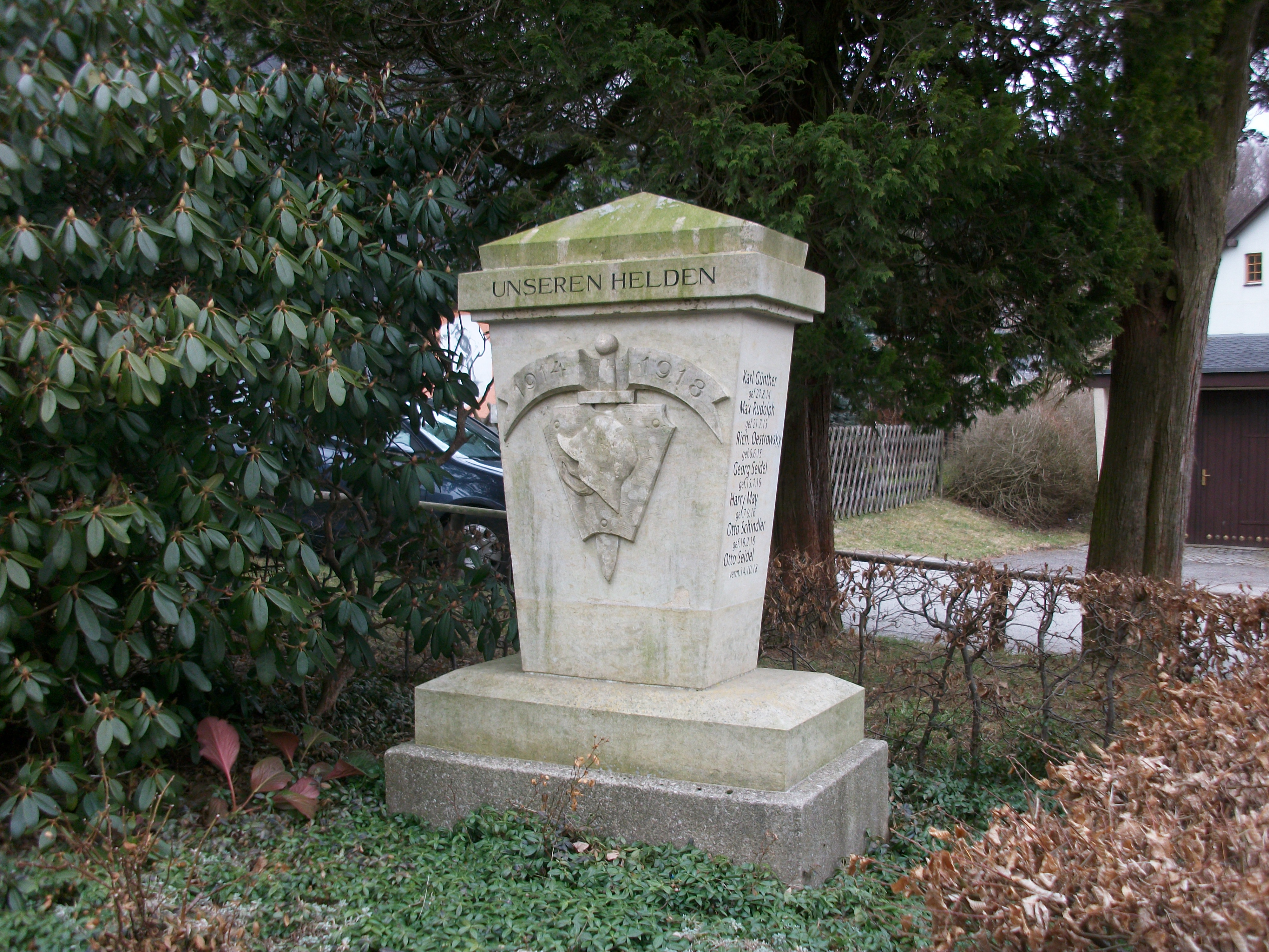 Streitwald (Lößnitz), Gefallenendenkmal